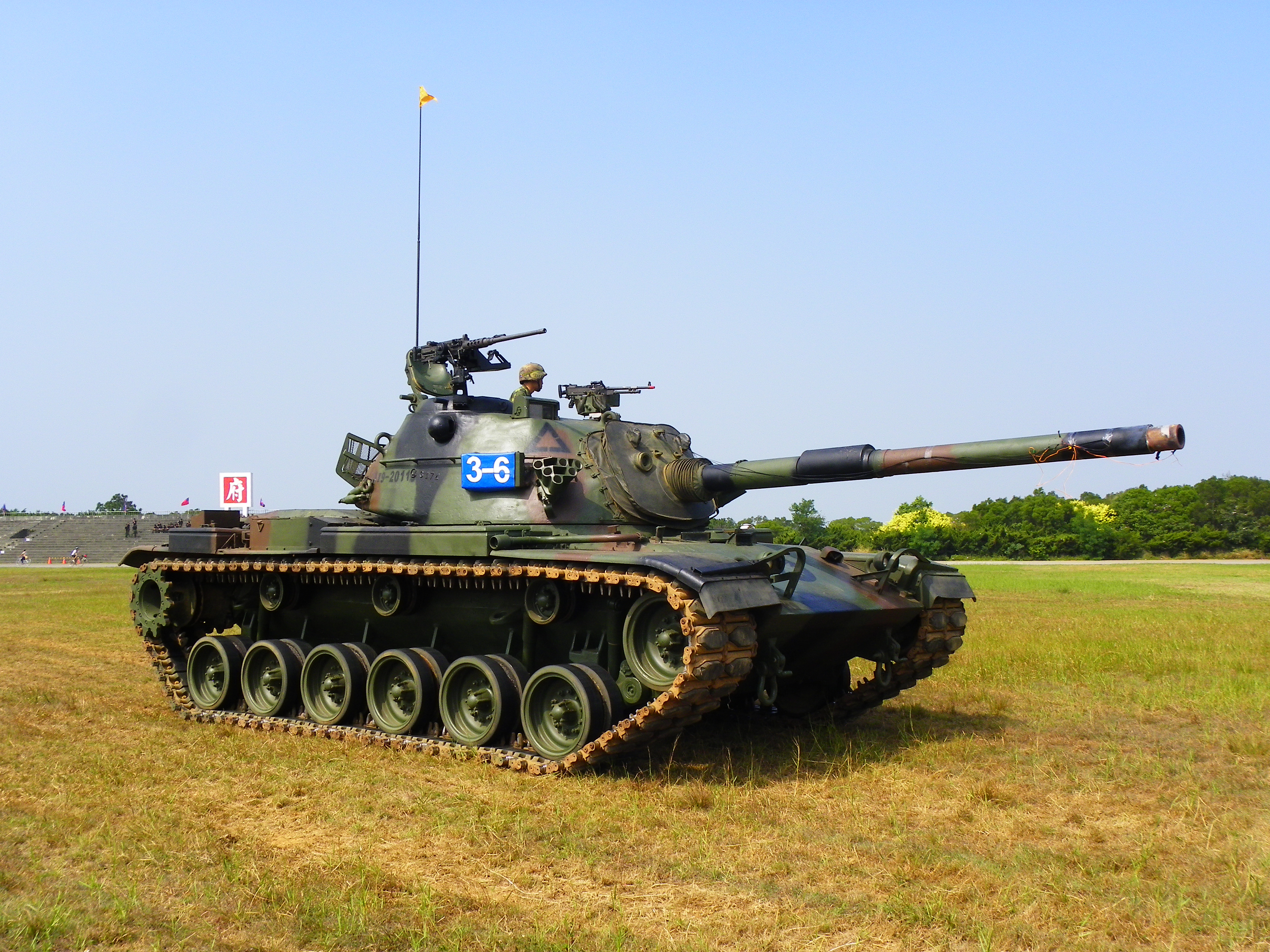 2011年陸軍湖口營區開放活動，地空整體作戰攻擊演練後，停留現場待命的CM-11戰車。